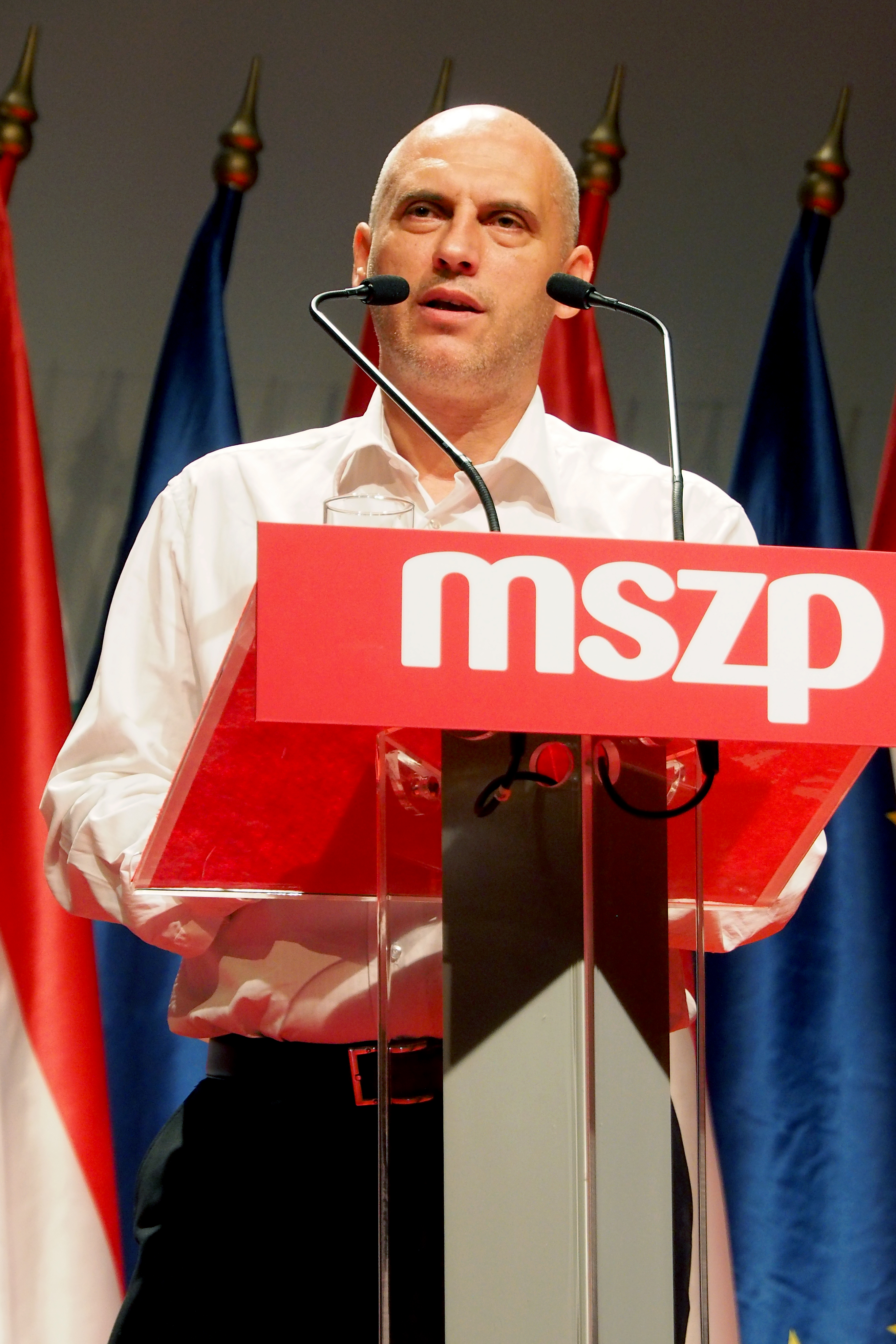 MSZP 2014. július kongresszusa. Tóbiás József megválasztott elnök